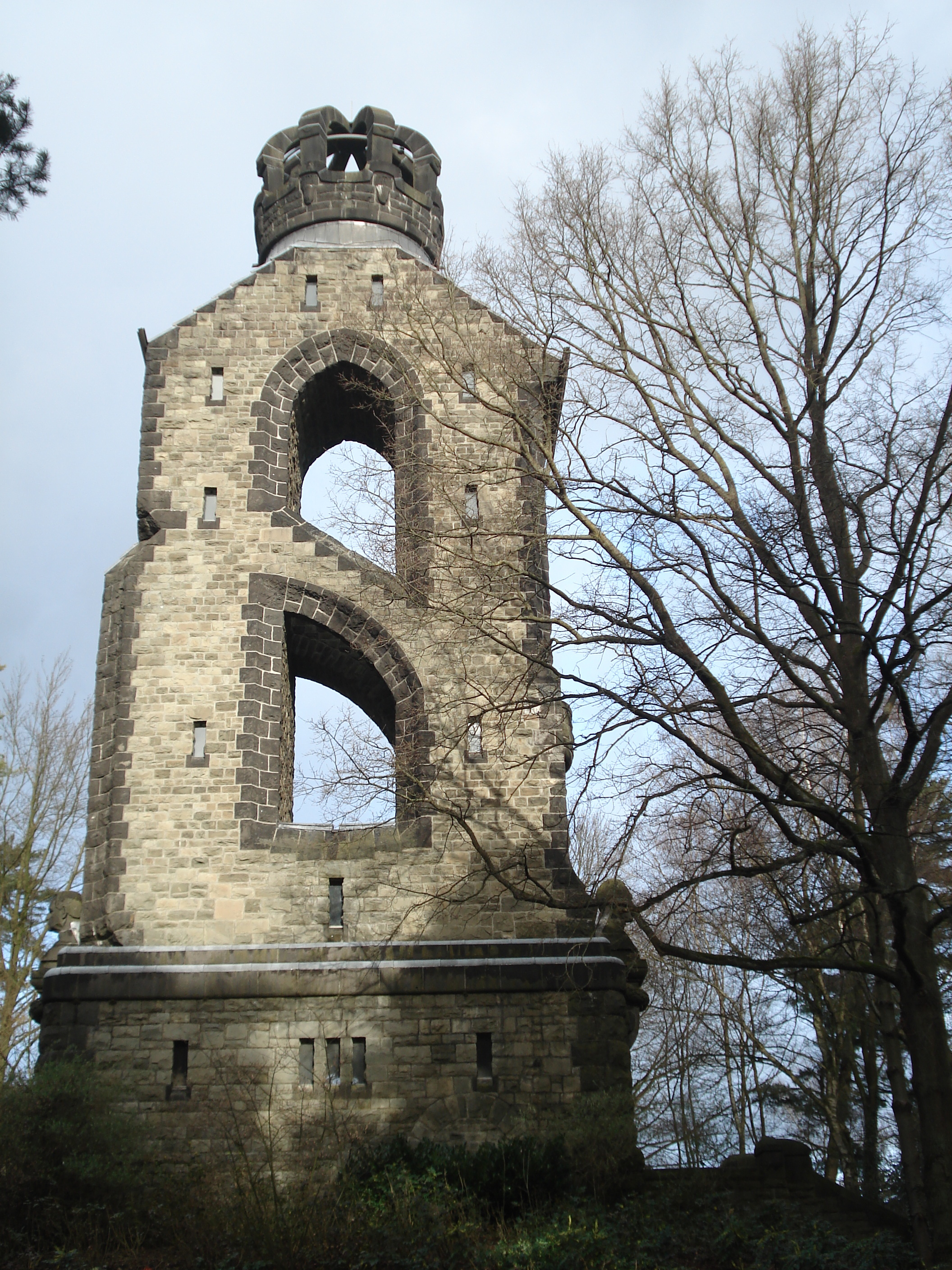 Bismarckturm auf dem Ehrenfriedhof (Waldfriedhof) in Aachen